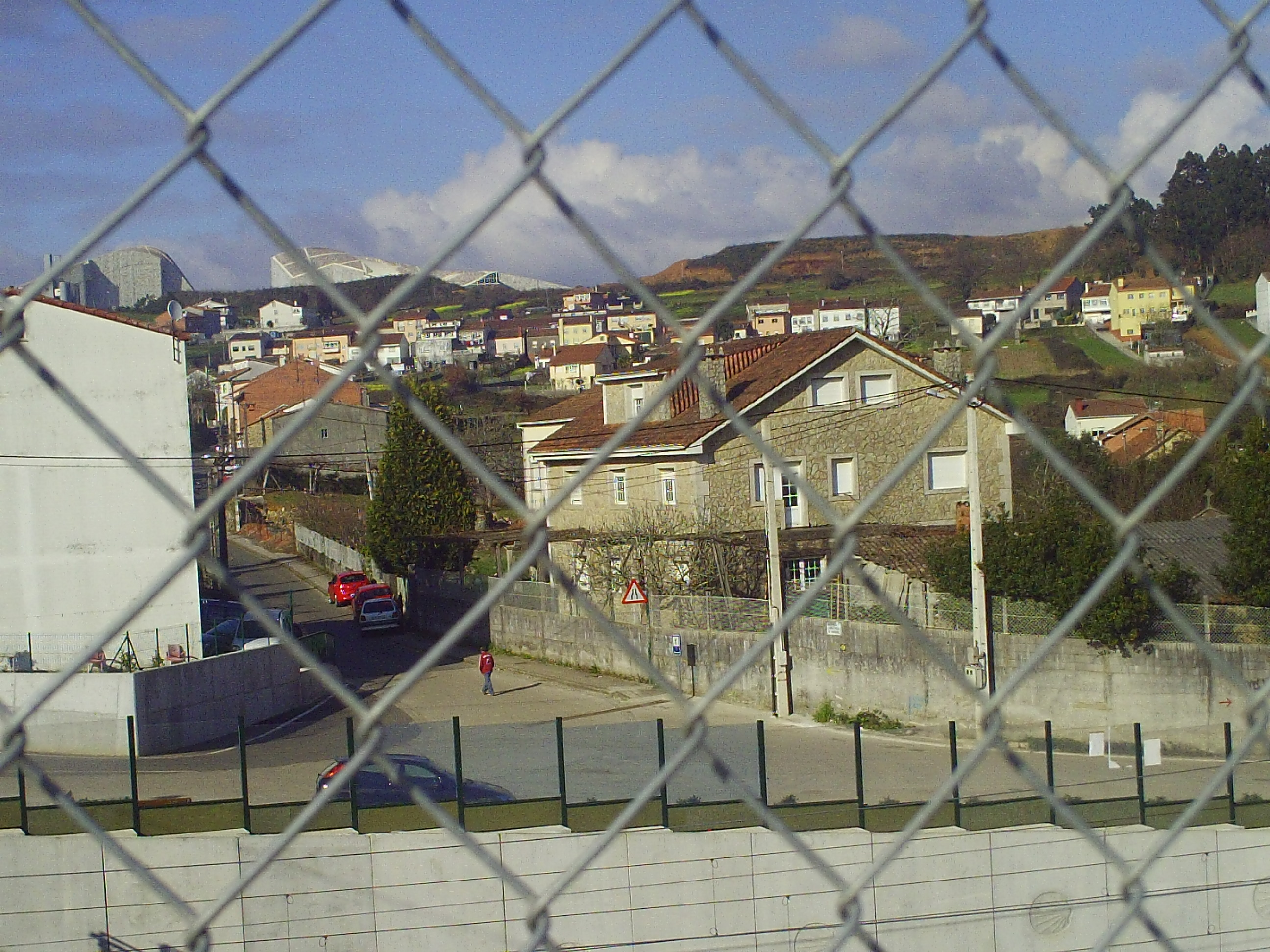 Angrois, vista de la aldea con la Ciudad de la Cultura al fondo.